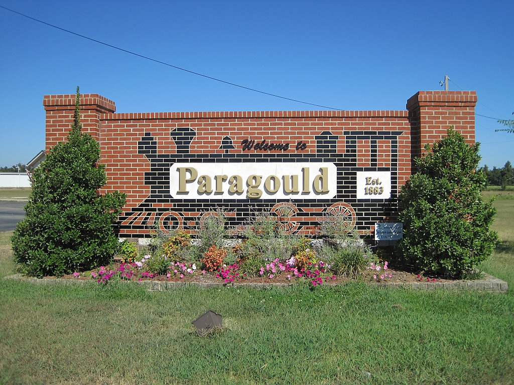 Paragould, Arkansas. Sign